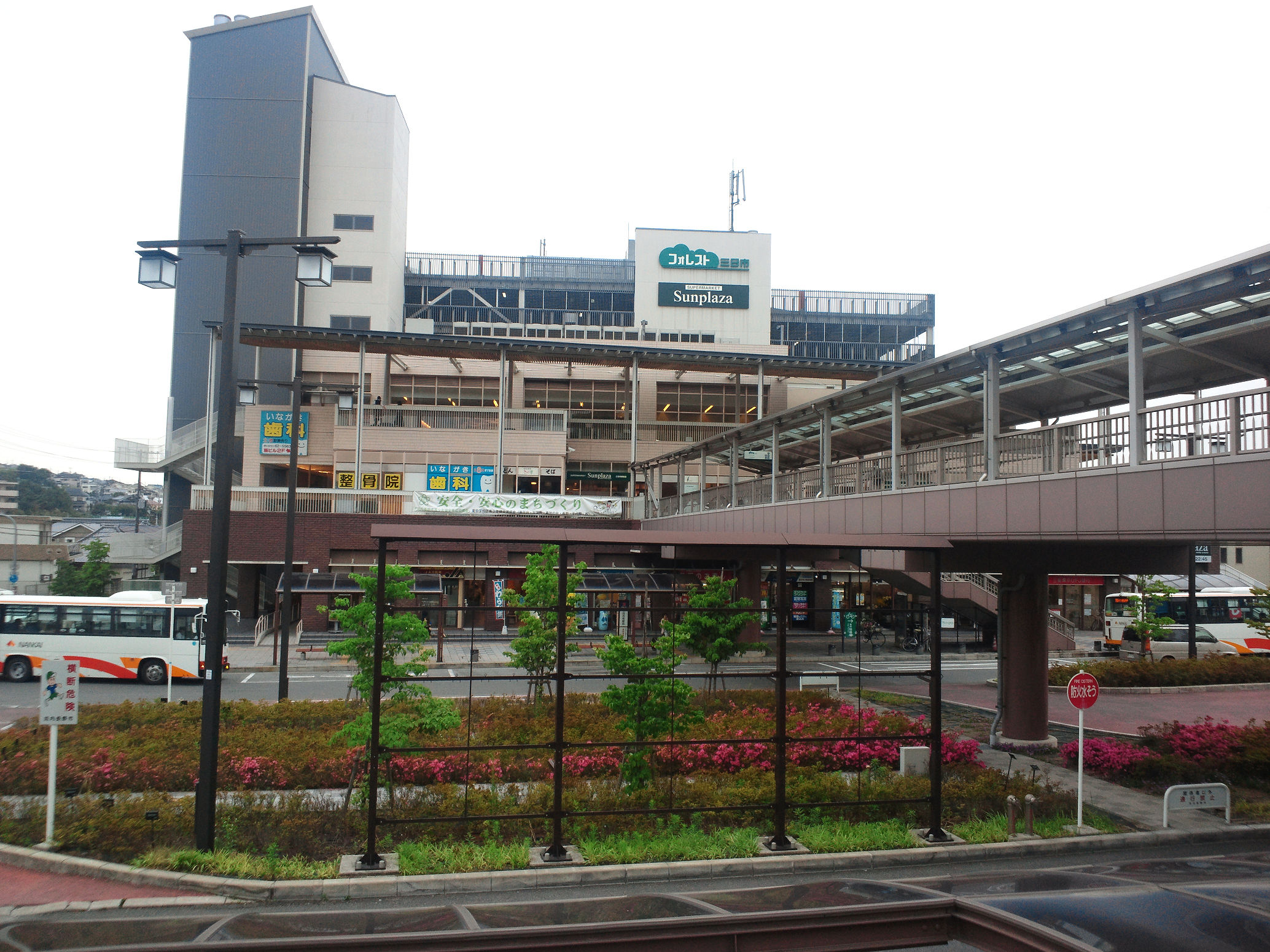 三日市町駅バスターミナル